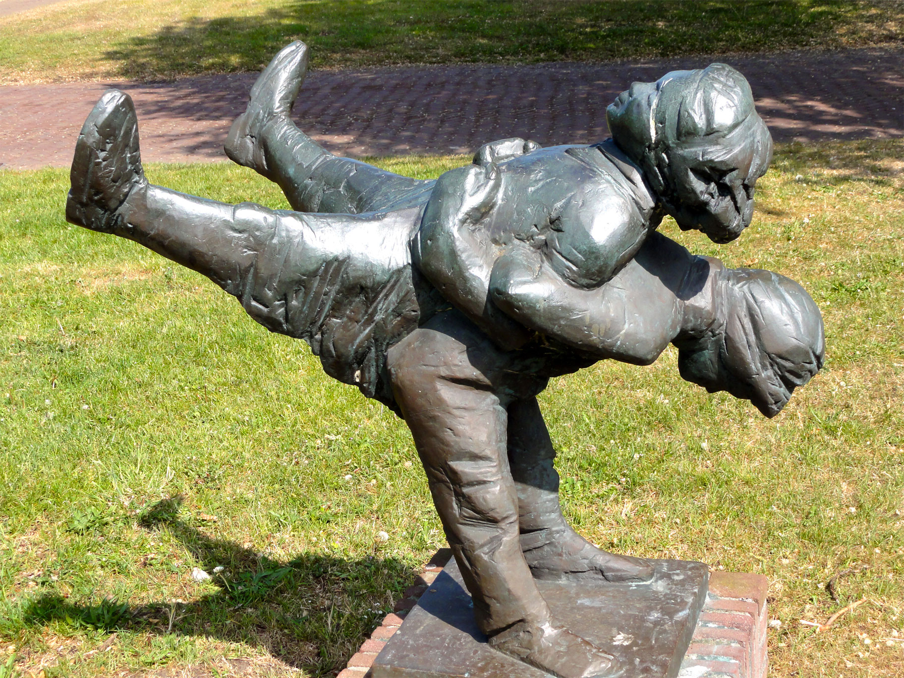 De Riich door Gosse Dam in Schiermonnikoog